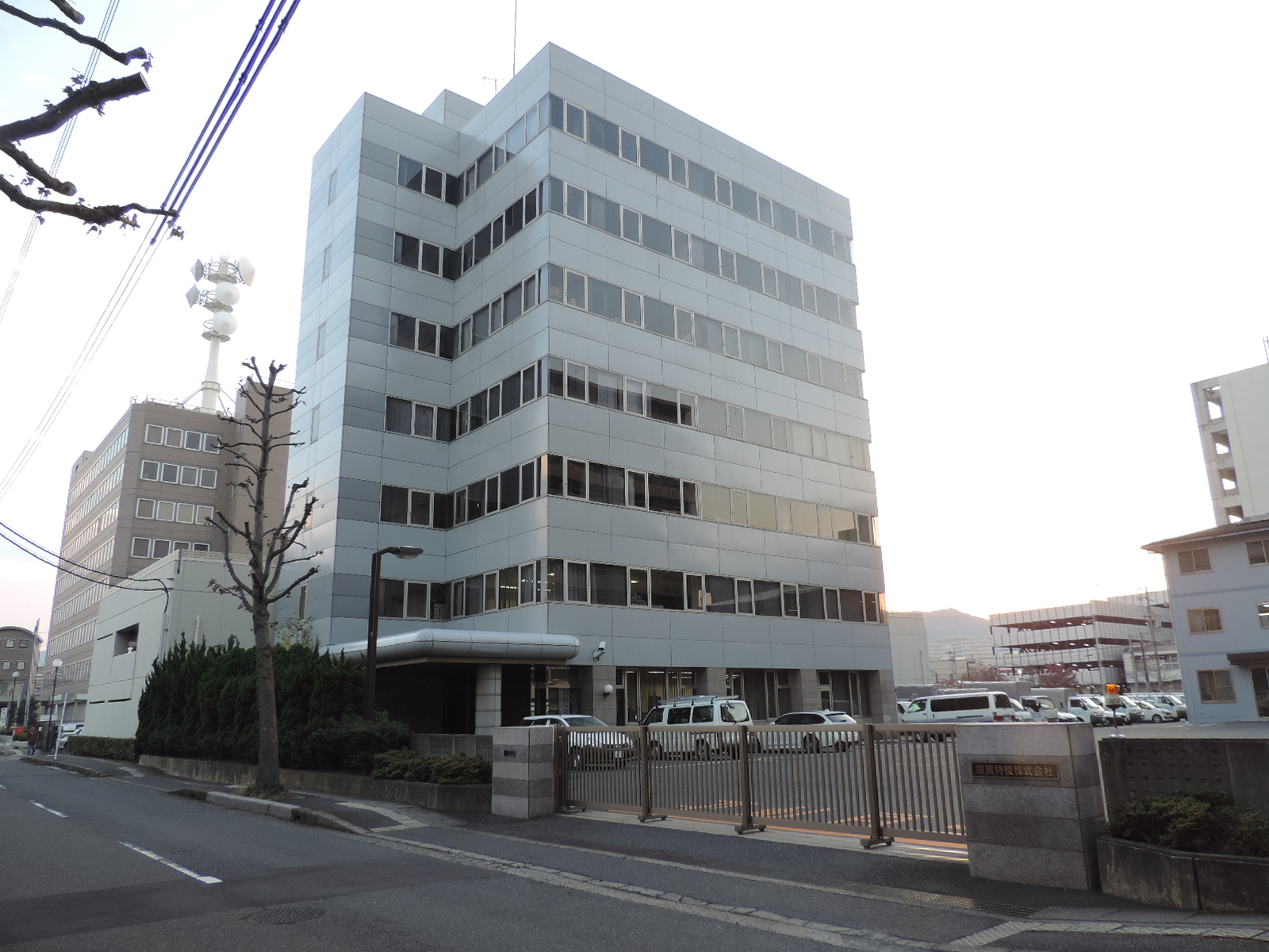 滋賀特機本社（滋賀県大津市）。2017年撮影